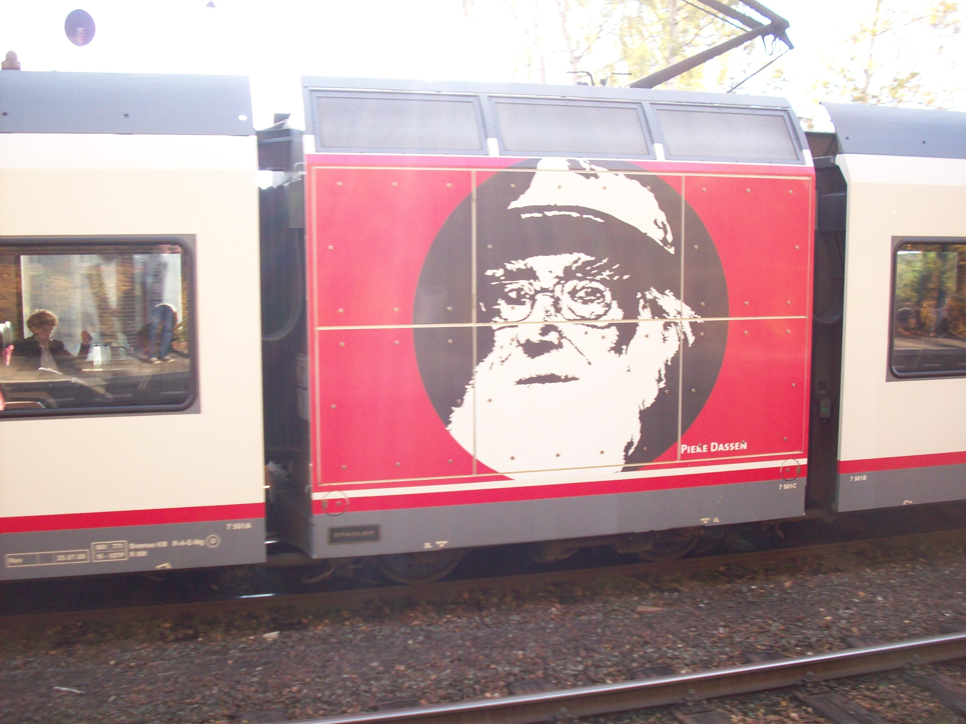 Velios GTW